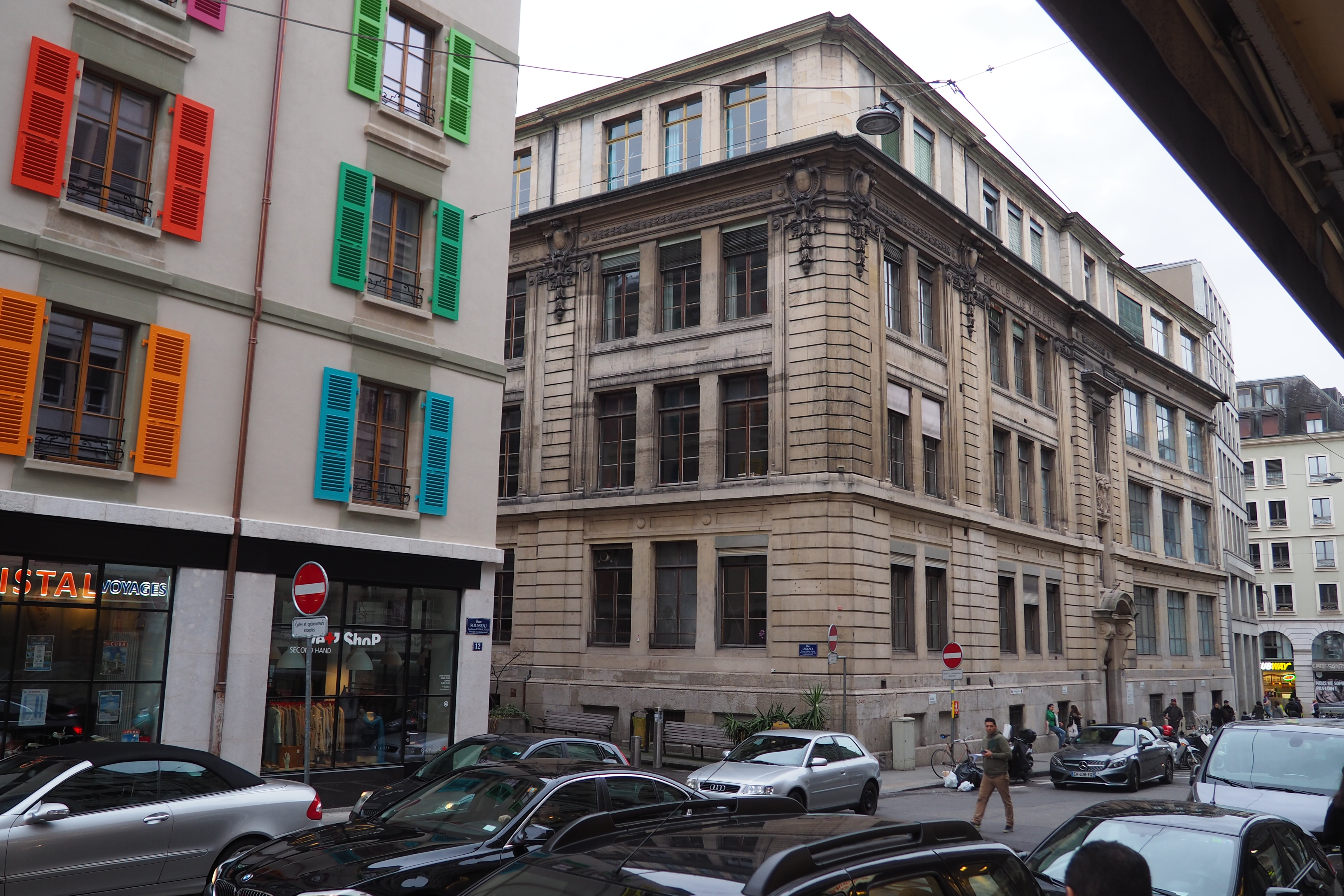 Rue Lissignol